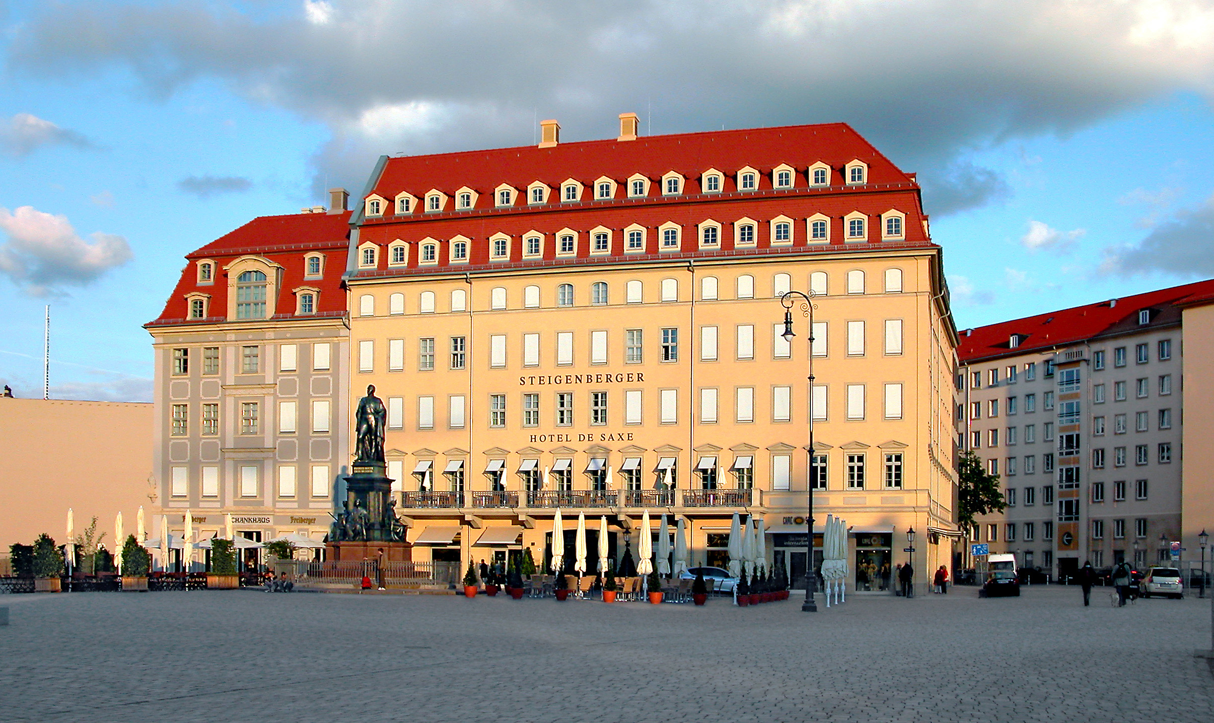 01.06.2006 01067 Dresden: Neumarkt 9: Steigenberger Hotel de Saxe, eröffnet am 03.04.2006. Der Hotelneubau wurde mit der Fassade des 1888 abgerissenen "Hotel de Saxe" versehen. Davor das Denkmal für Friedrich August II. Links das Freiberger Schankhaus im Gebäude der wieder aufgebauten einstigen Salomonis Apotheke (Anf. 18. Jh.). [DSCN10288]20060601015DR.JPG(c)Blobelt